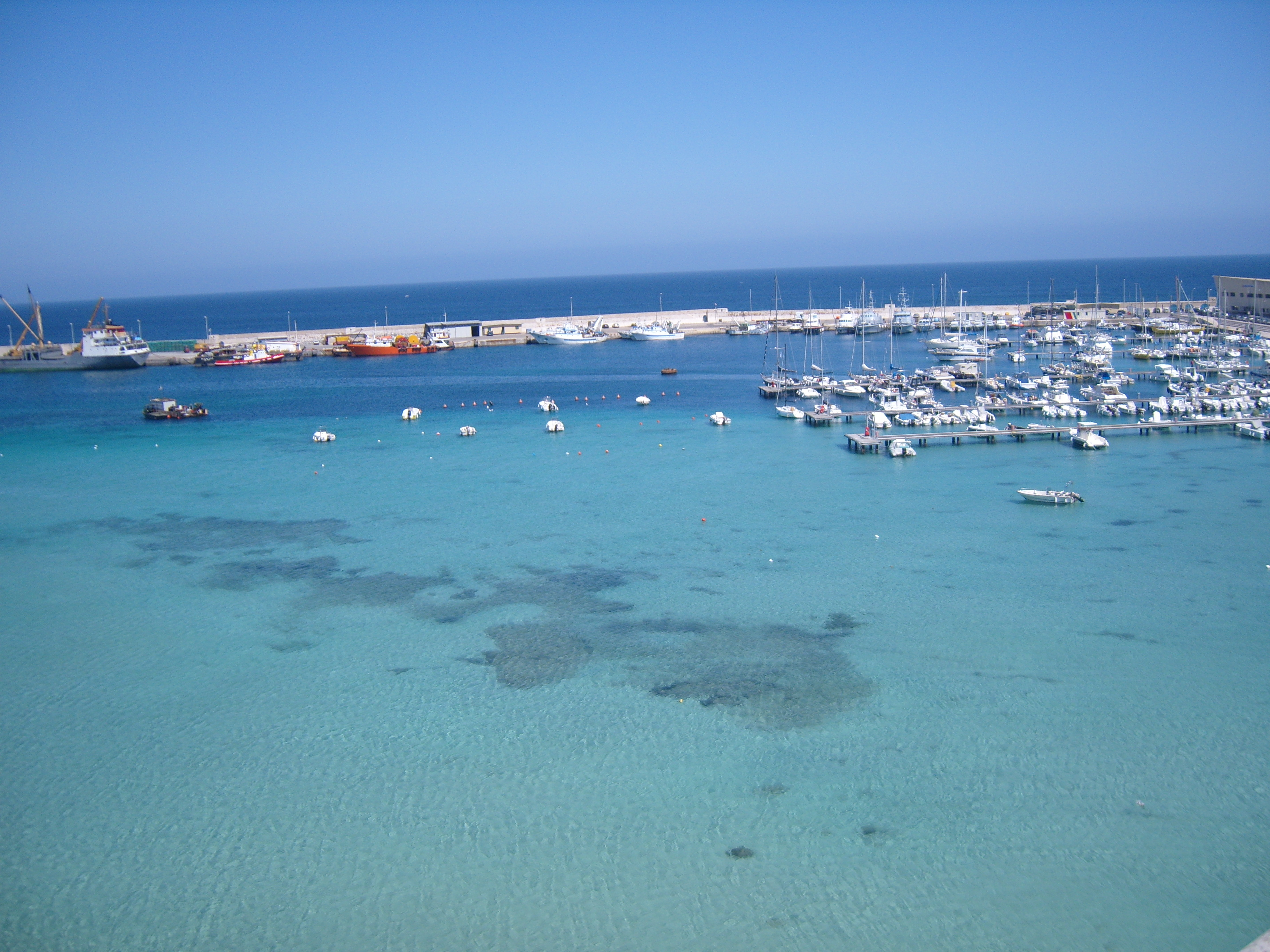 Otranto harbour